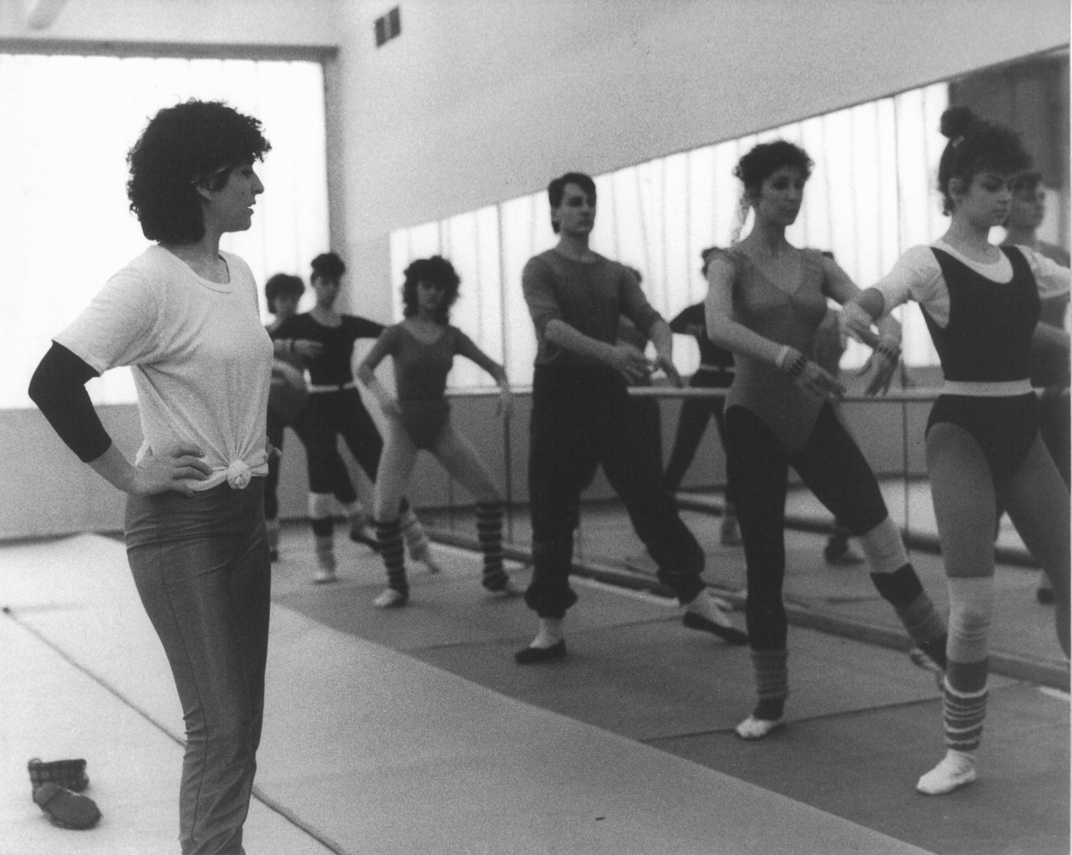 Zkouška tanečníků Pop Baletu Věry Veselé - Chrudimského tanečního studia.